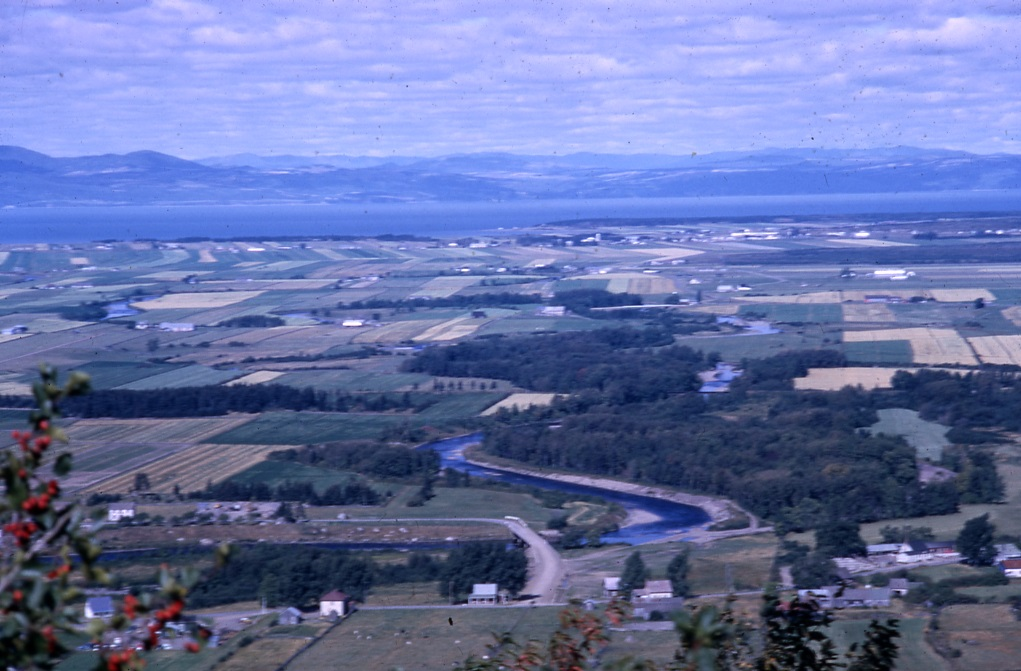 Diapositive positive illustrant une vue sur Saint-Pacôme et ses environs dans la région administrative du Bas-Saint-Laurent.